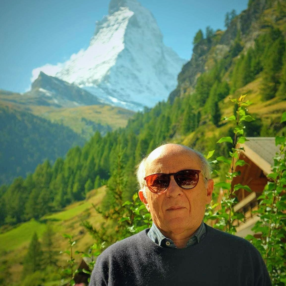 Alessandro Berdini, regista e organizzatore teatrale